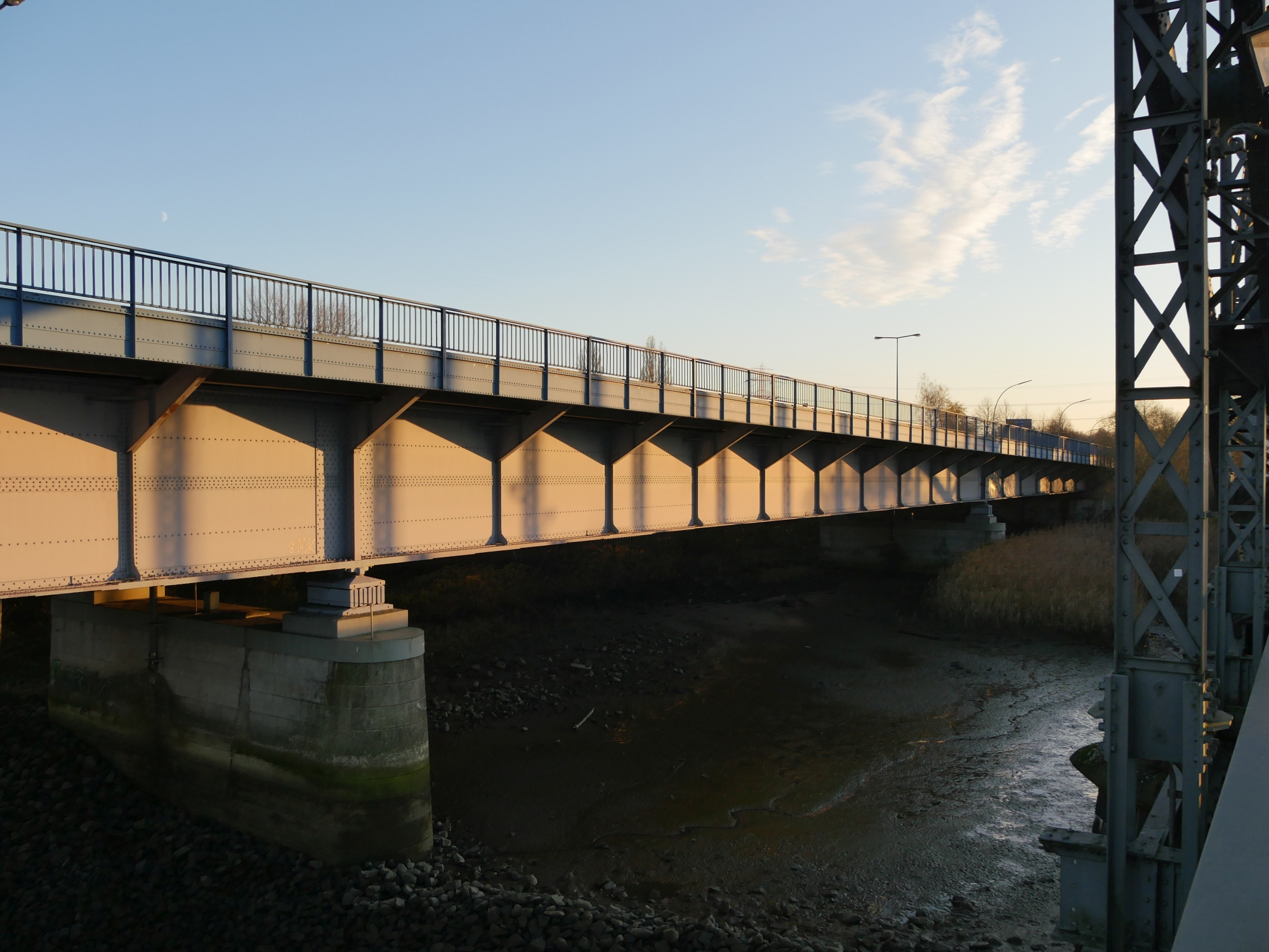 Brücke des 17. Juni